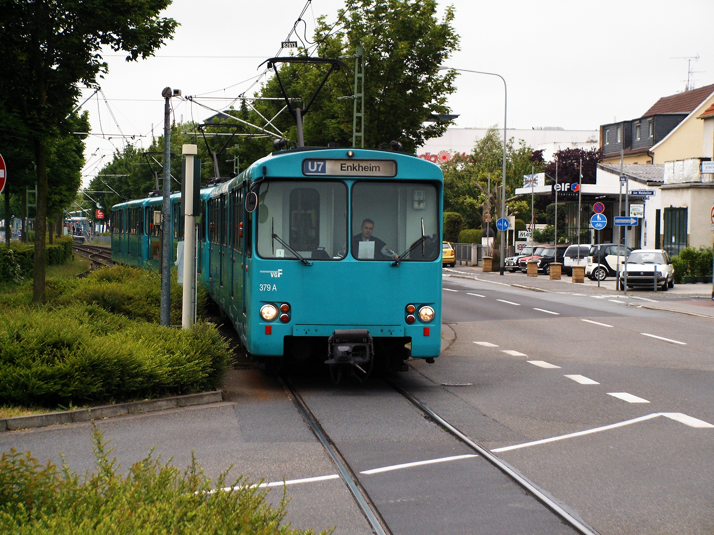 Wagen der U-Bahn Frankfurt, Linie 7, kurz vor der Einfahrt in die Endhaltestelle Enkheim auf Gleis 1